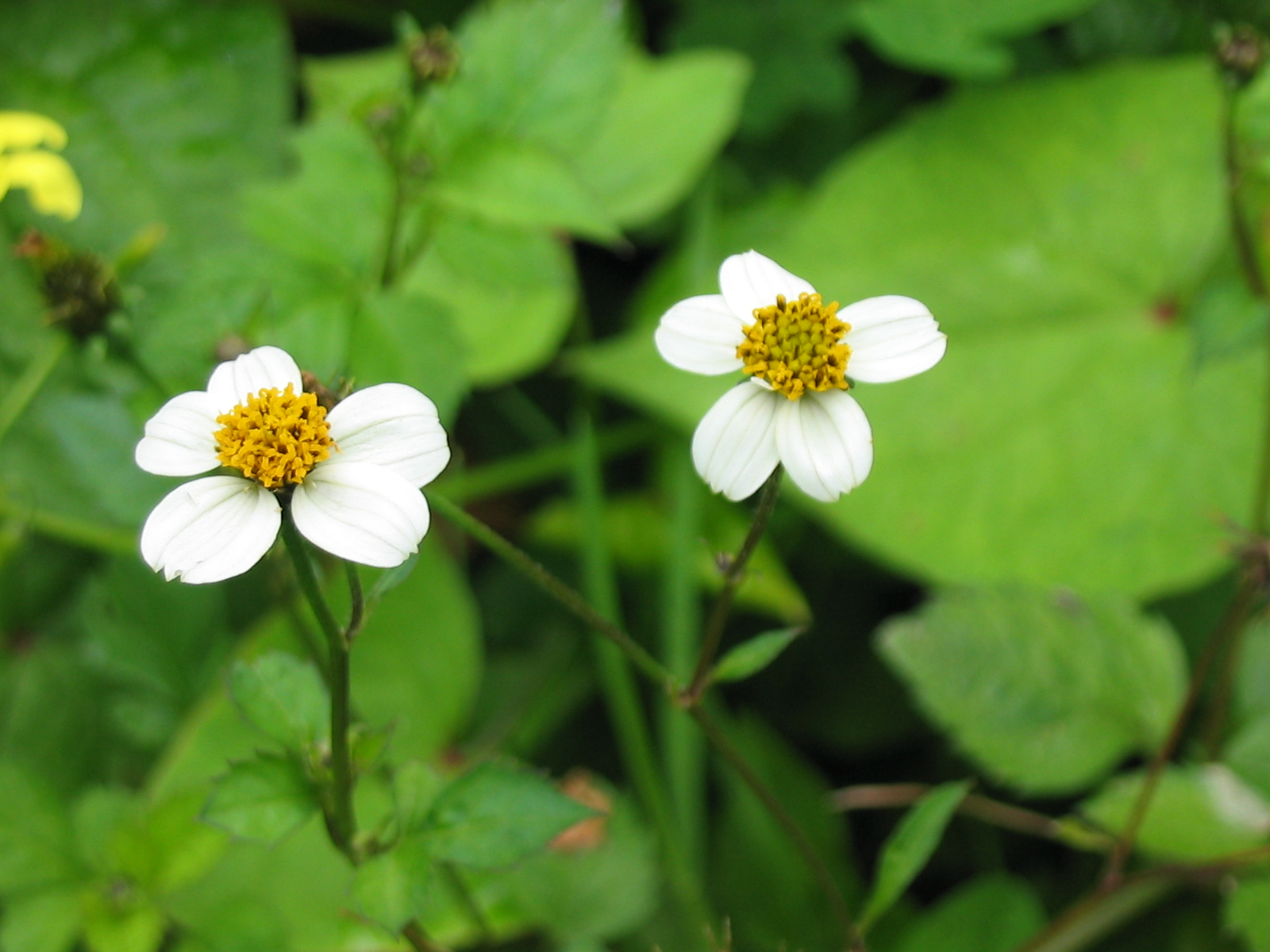 Nagelkraut (Bidens pilosa) - Flowers